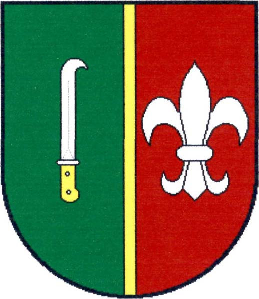 Znak obce Kobylnice